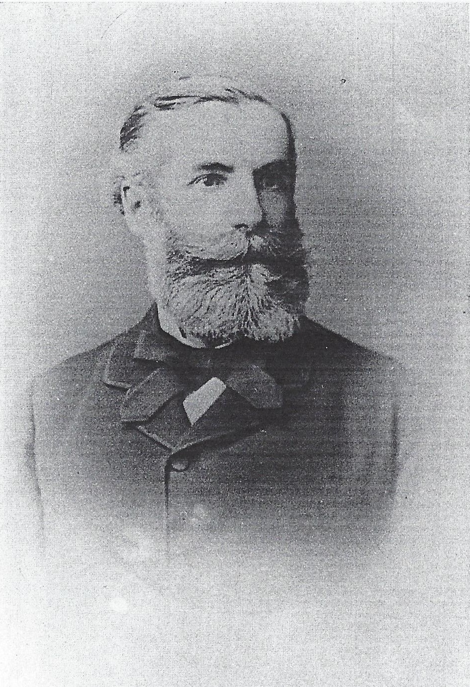 Porträtfotografie von Robert Lucius-Ballhausen (1835-1914)